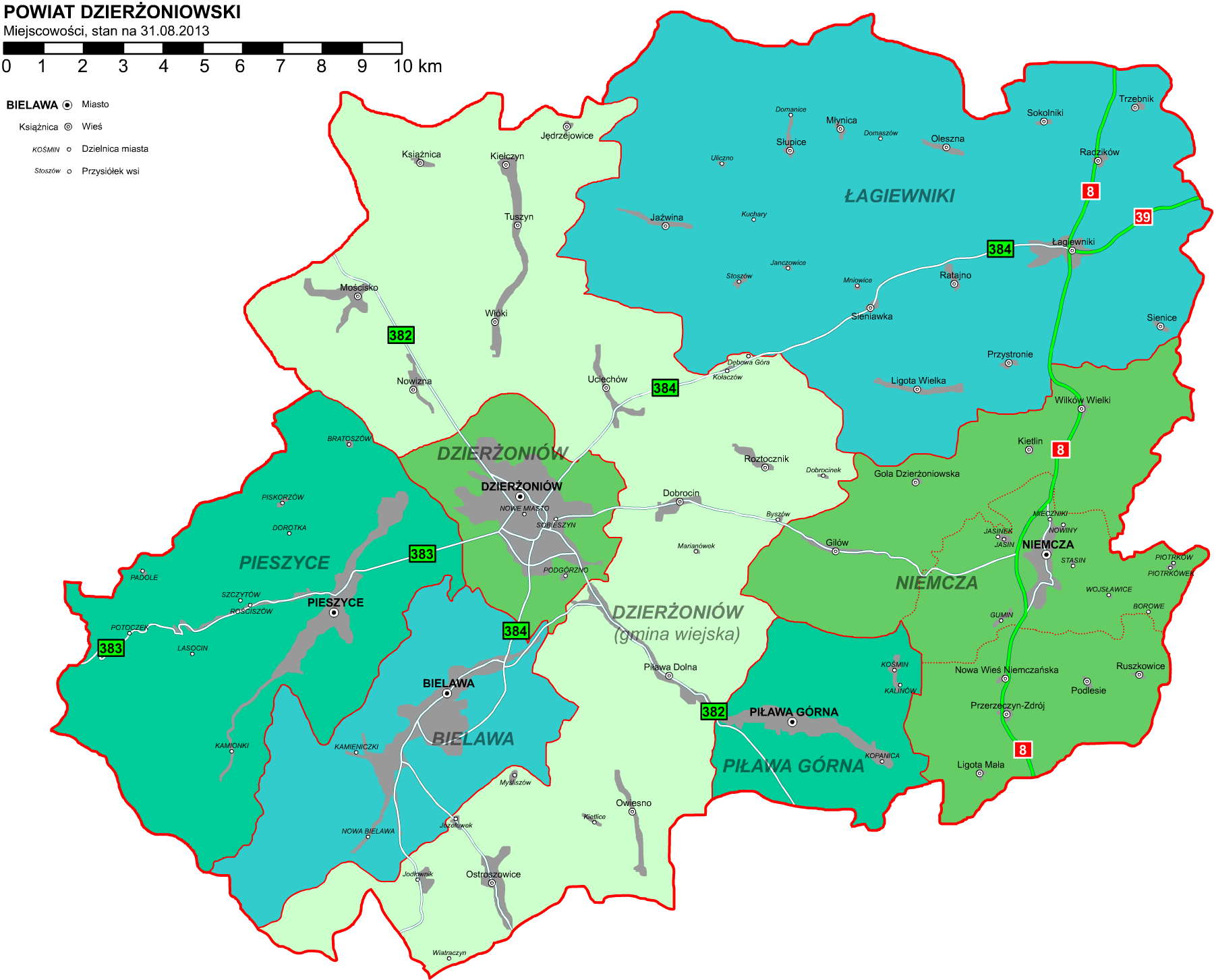 Powiat dzierżoniowski. Mapa zawiera wszystkie miejscowości znajdujące się w powiecie. Nie zaznaczono Albinowa i Borowicy, byłych przysiółków Uciechowa.